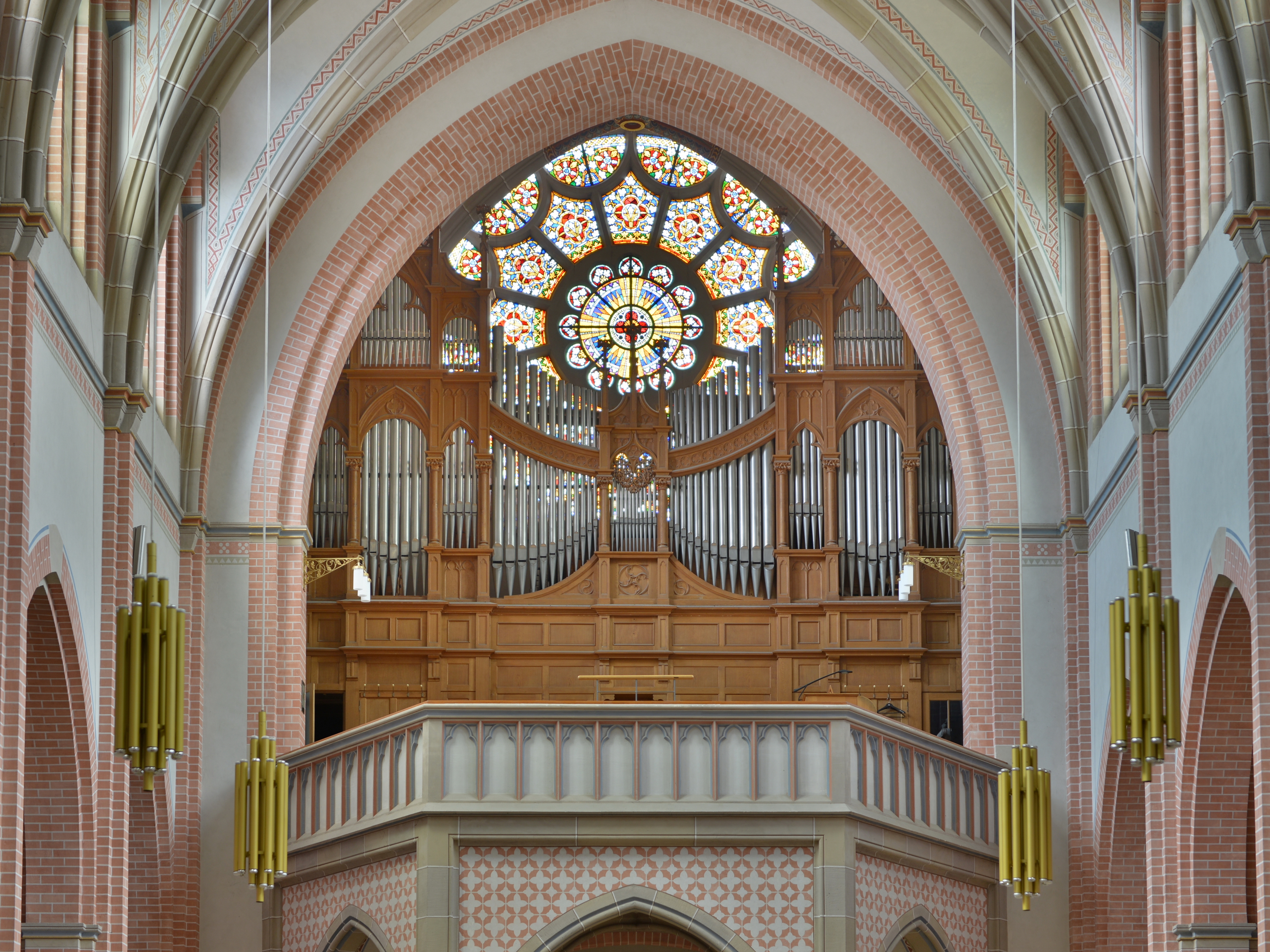 Herz-Jesu-Kirche in Bregenz. Architekt: Joseph Cades Baujahre 1905/08, Baumeister: Kornel Rhomberg aus Bregenz sowie Paul Faulhaber aus Rottweil.